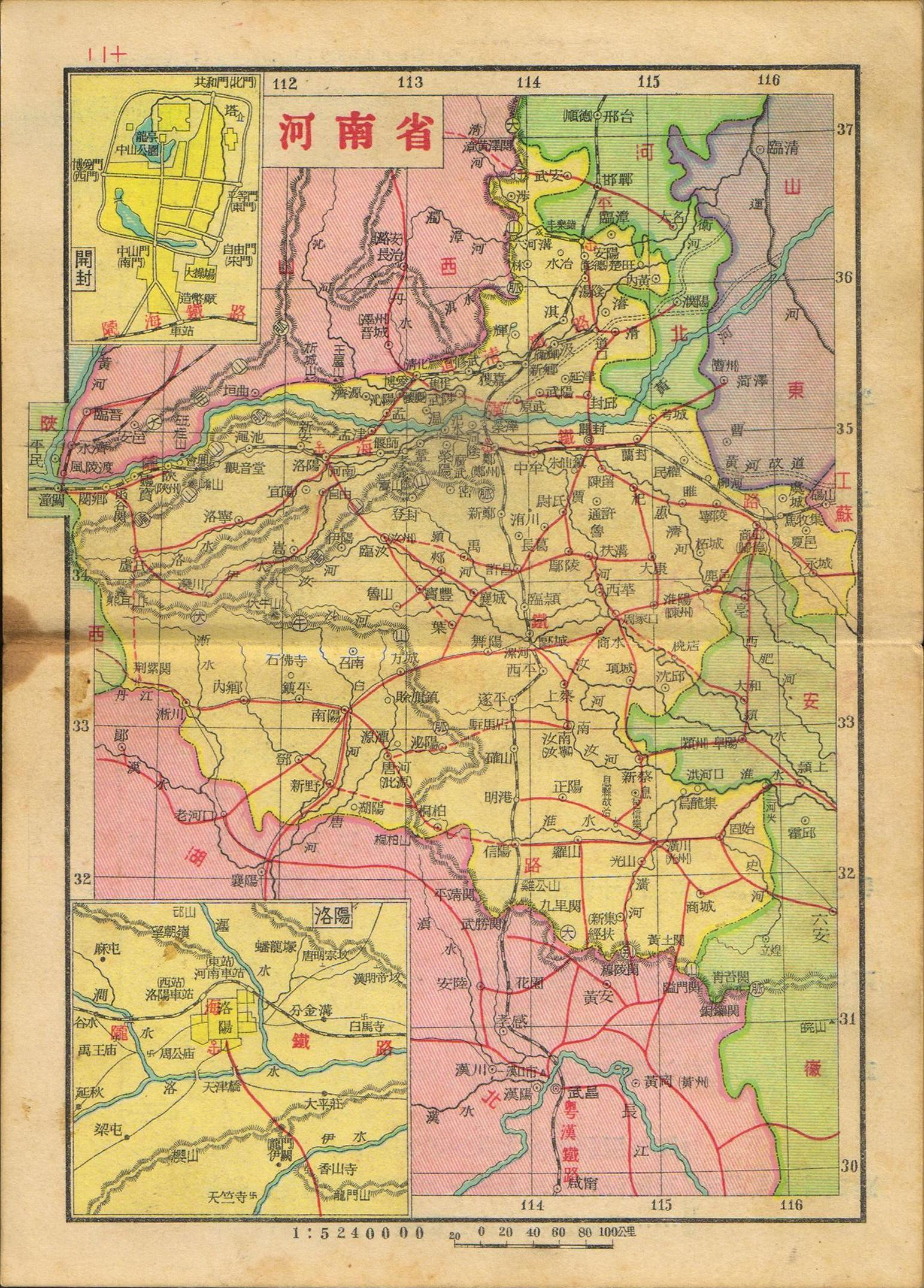 亚新地学社1936年《袖珍中华全图》河南省